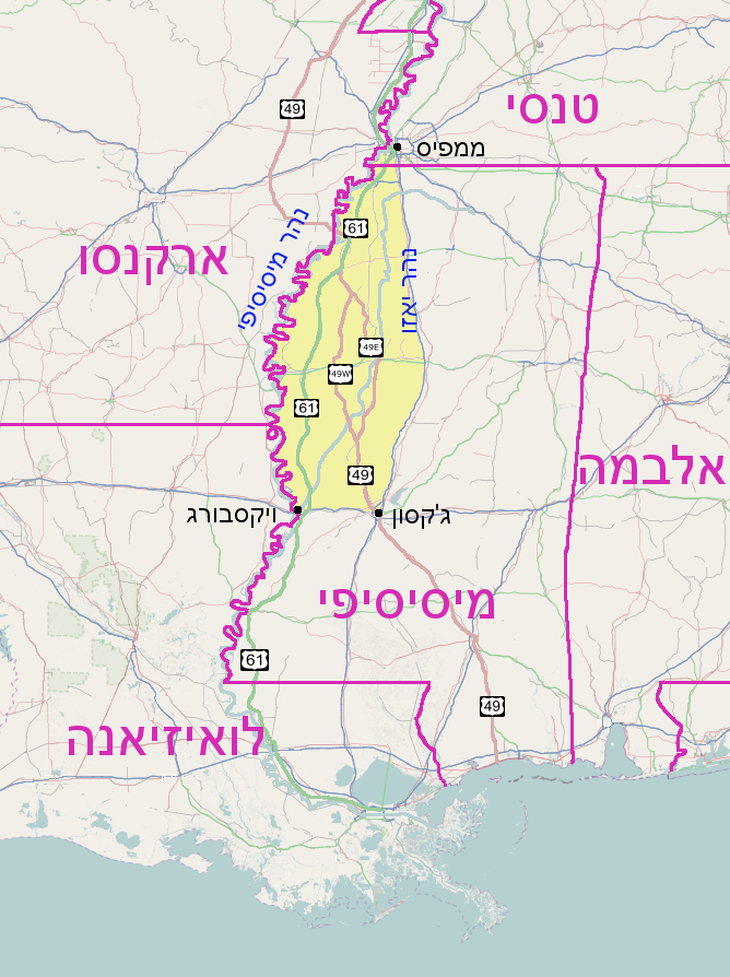 מרכז דרום ארה"ב ודלתת המיסיסיפי